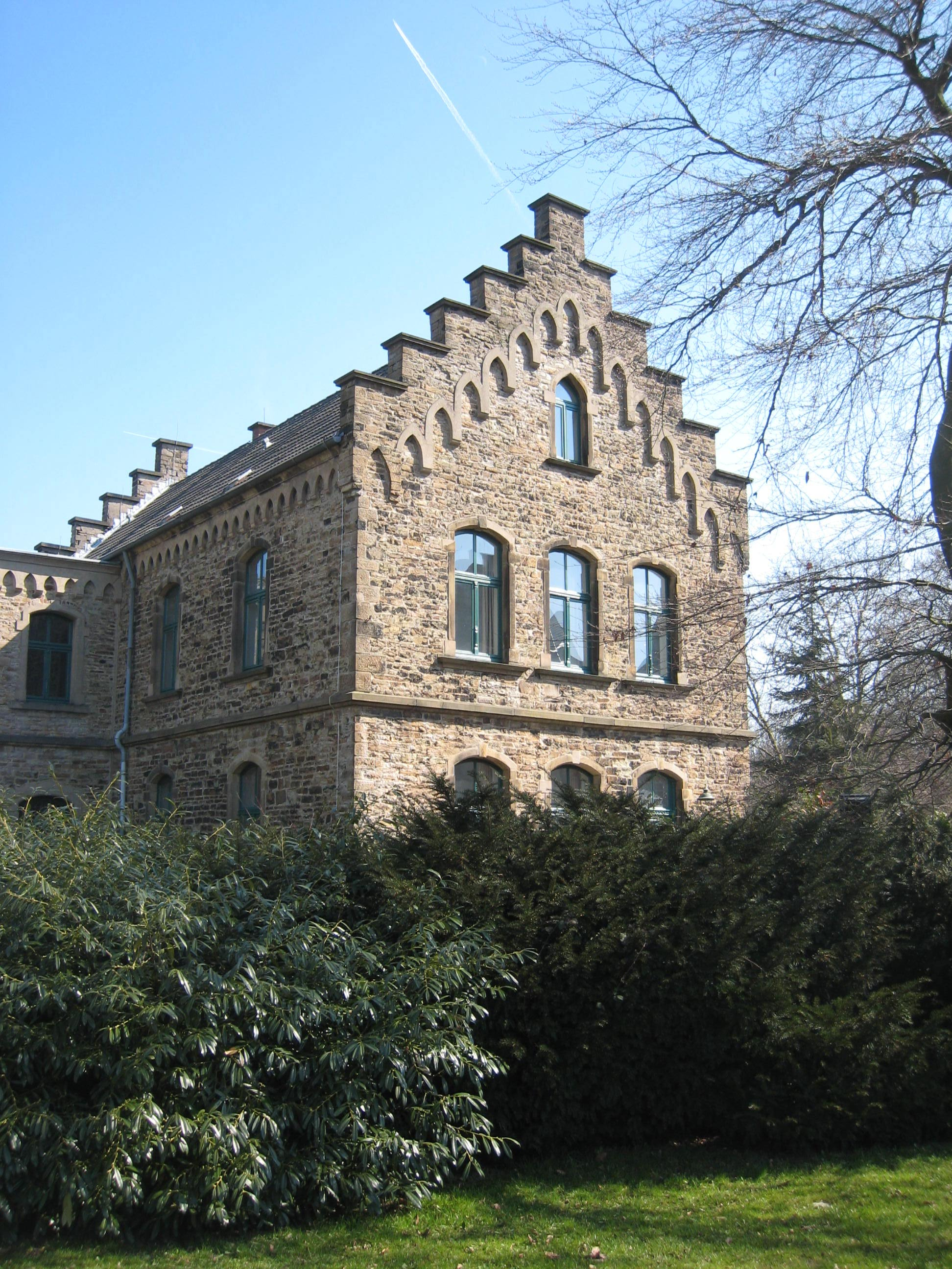 Haus Opherdicke (Wirtschaftgebäude)